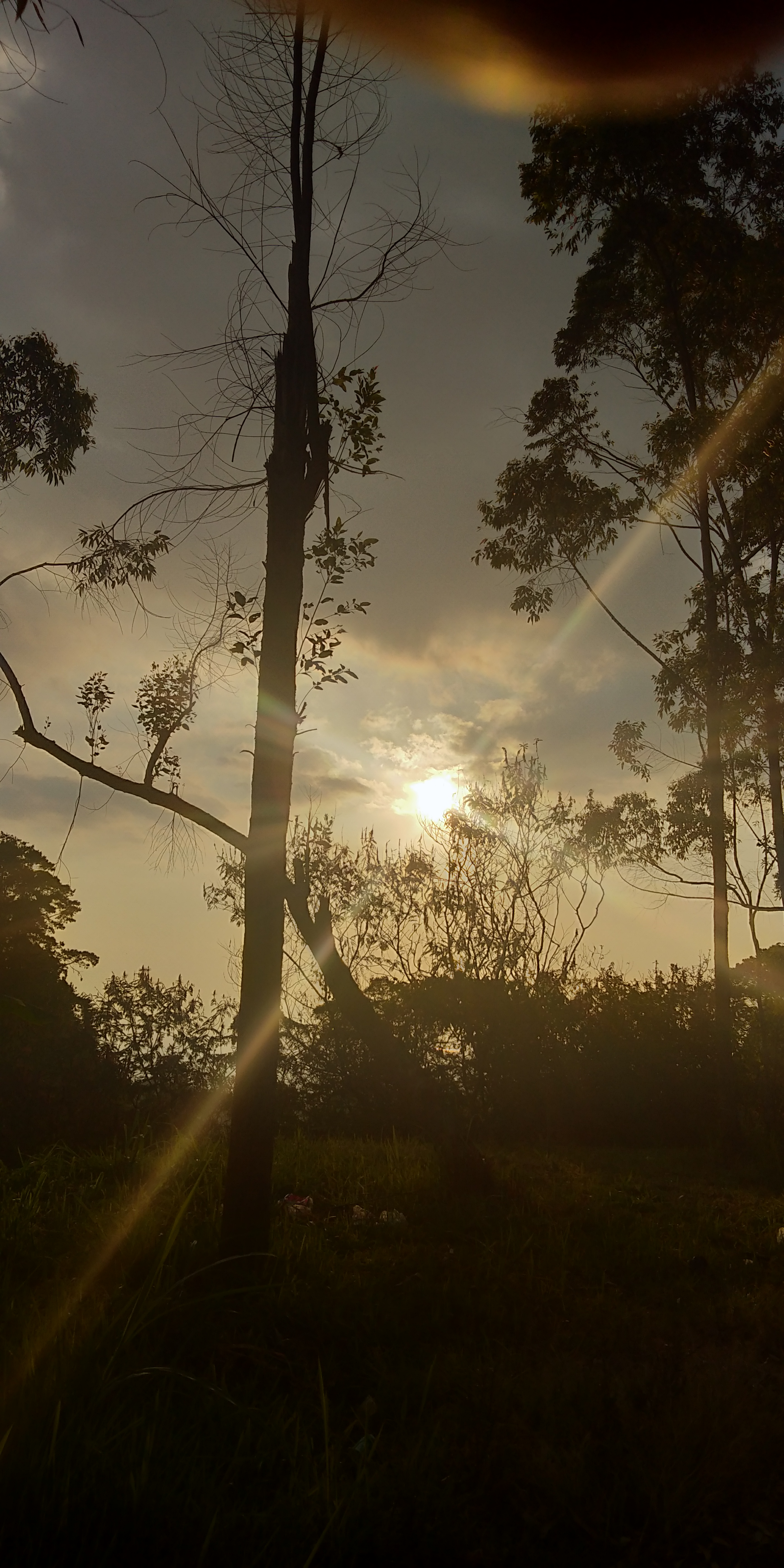 Basa Jawa: menika ingkang foto saking pemandangan wonten daerah Karanganyar.